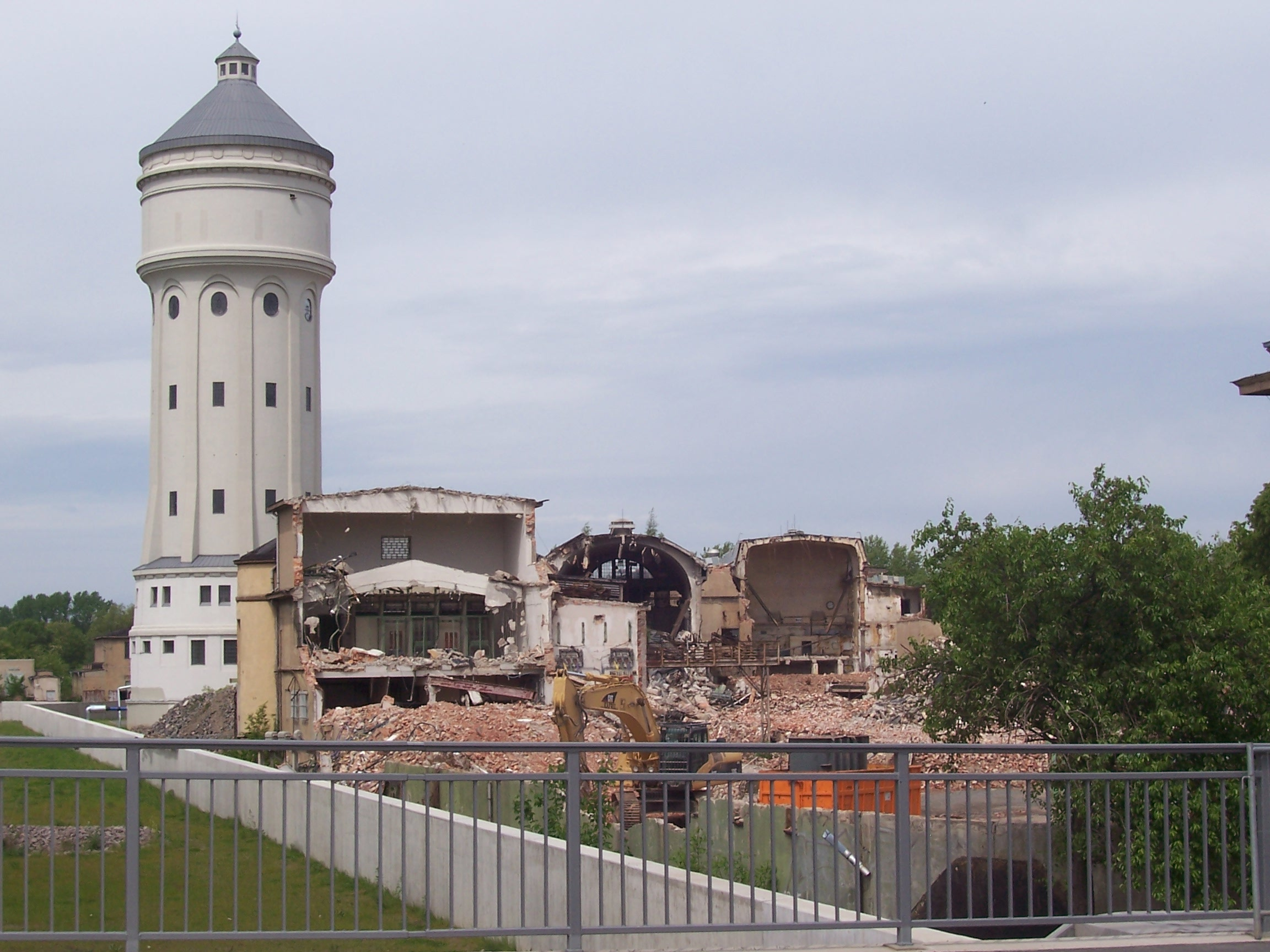 ECW-Fabrikhallen während des Abriss (gesehen von der Ziegelstraße)